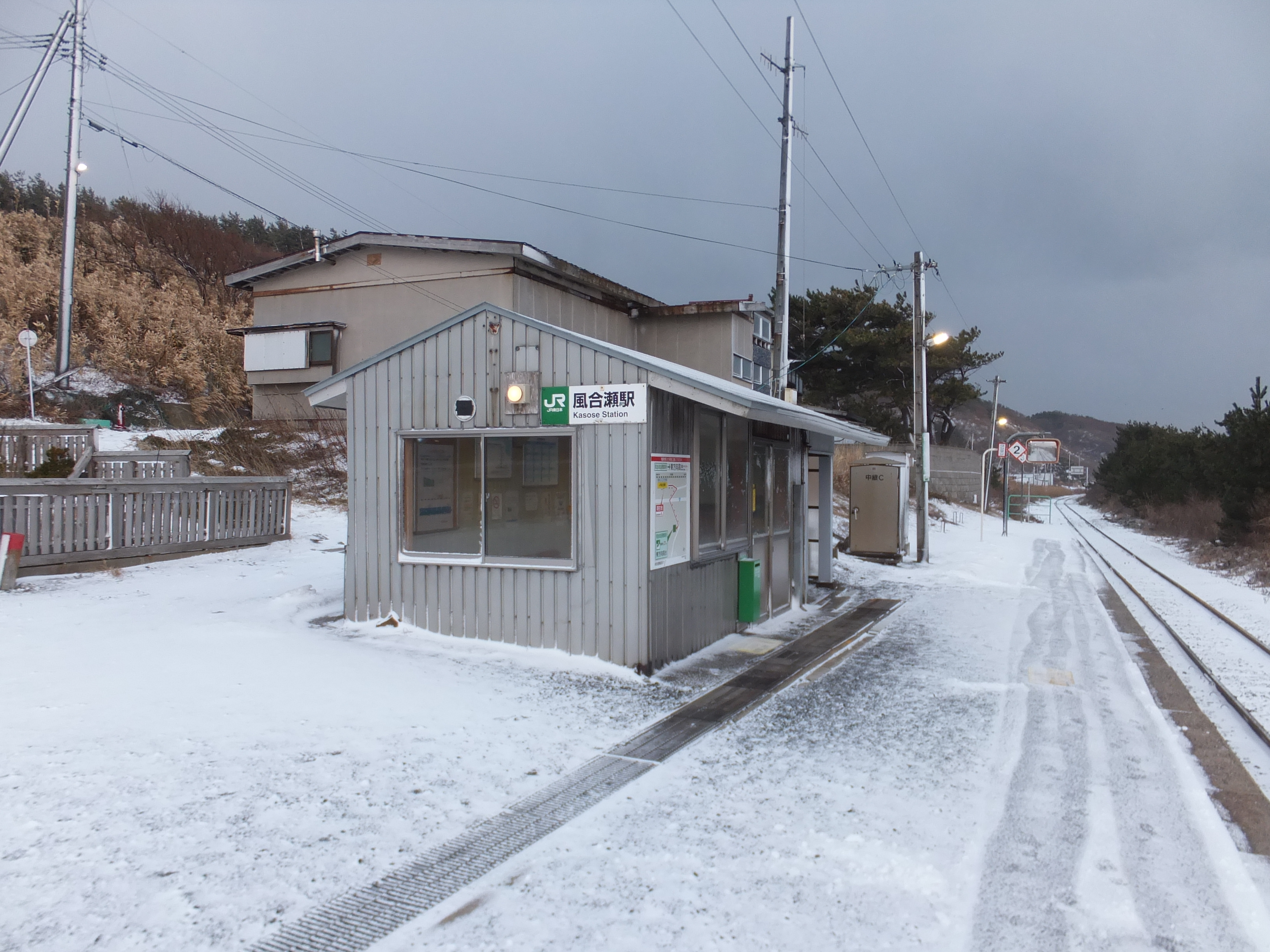 五能線・風合瀬（かそせ）駅（青森県西津軽郡深浦町）。